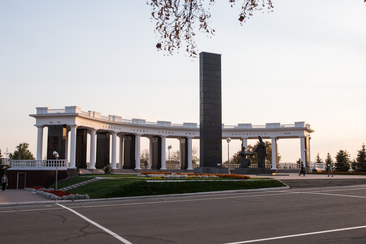 Памятник воинам-землякам, погибшим в годы Великой Отечественной войны: улица Советская, Саранск, Мордовия